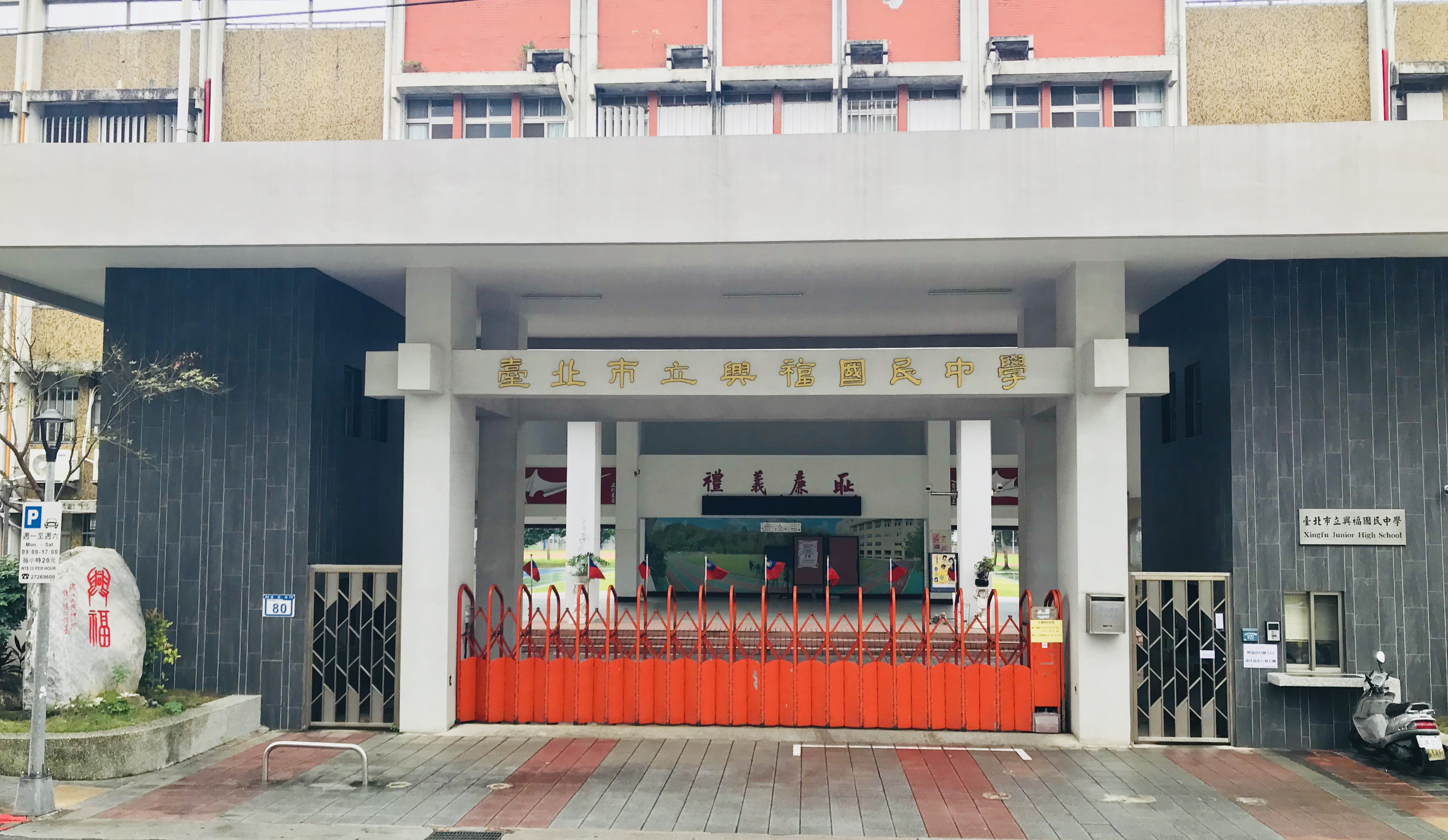 臺北市立興福國民中學大門